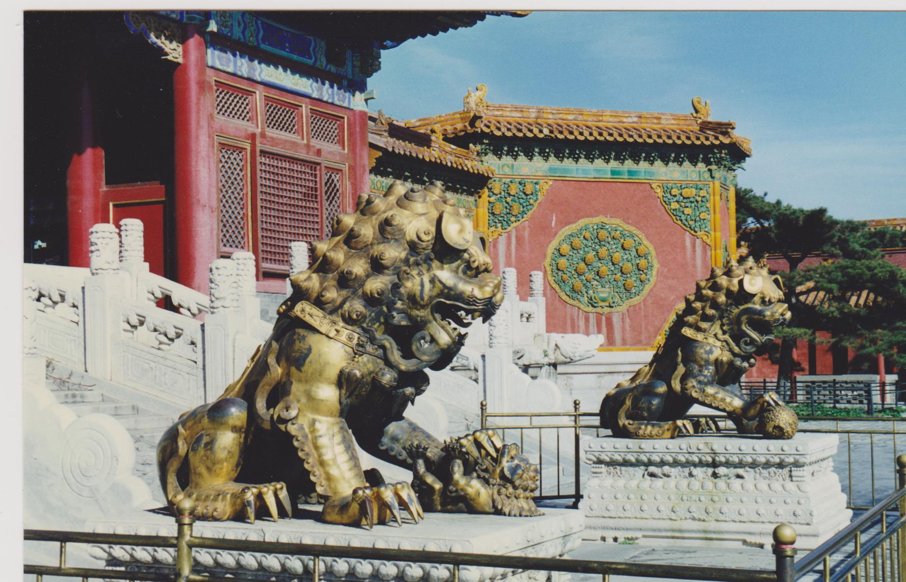 Beijing, the Forbidden City